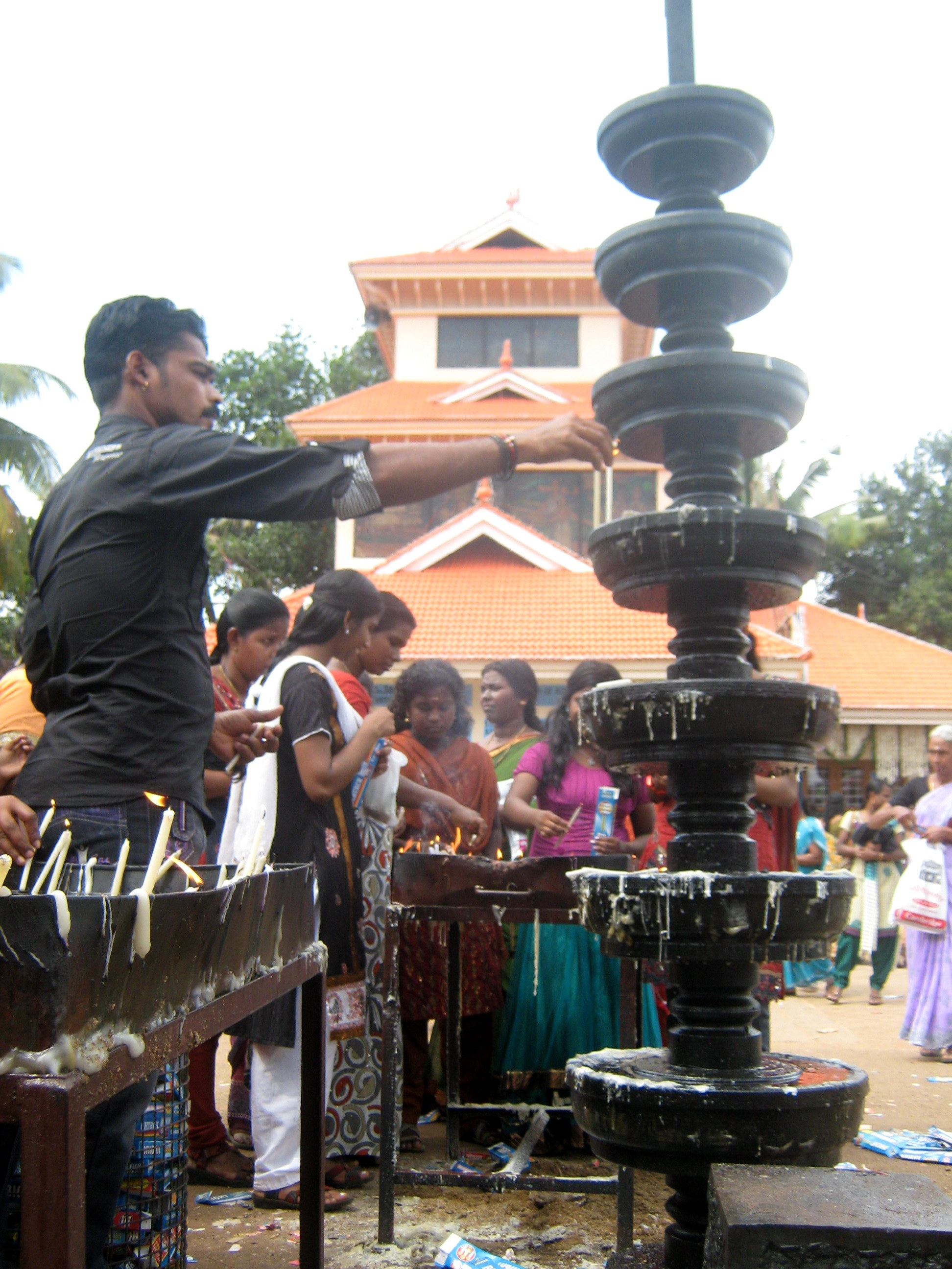 കൊരട്ടിമുത്തി തിരുനാള്‍ 2012